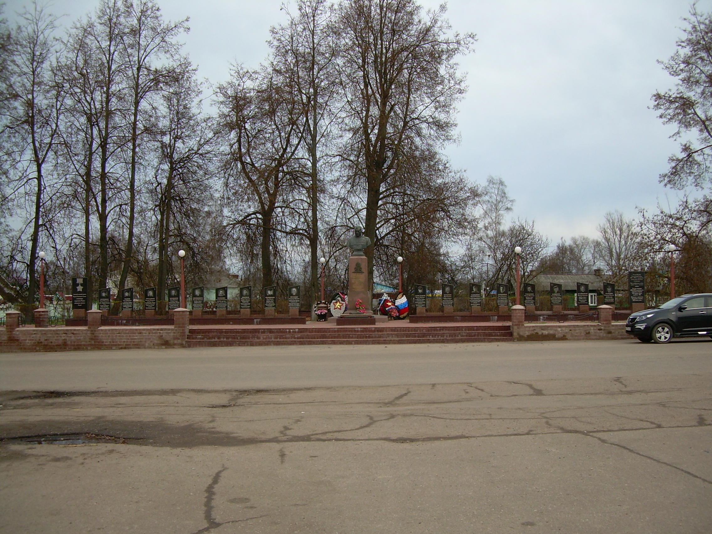 Аллея Героев в городе Починок.